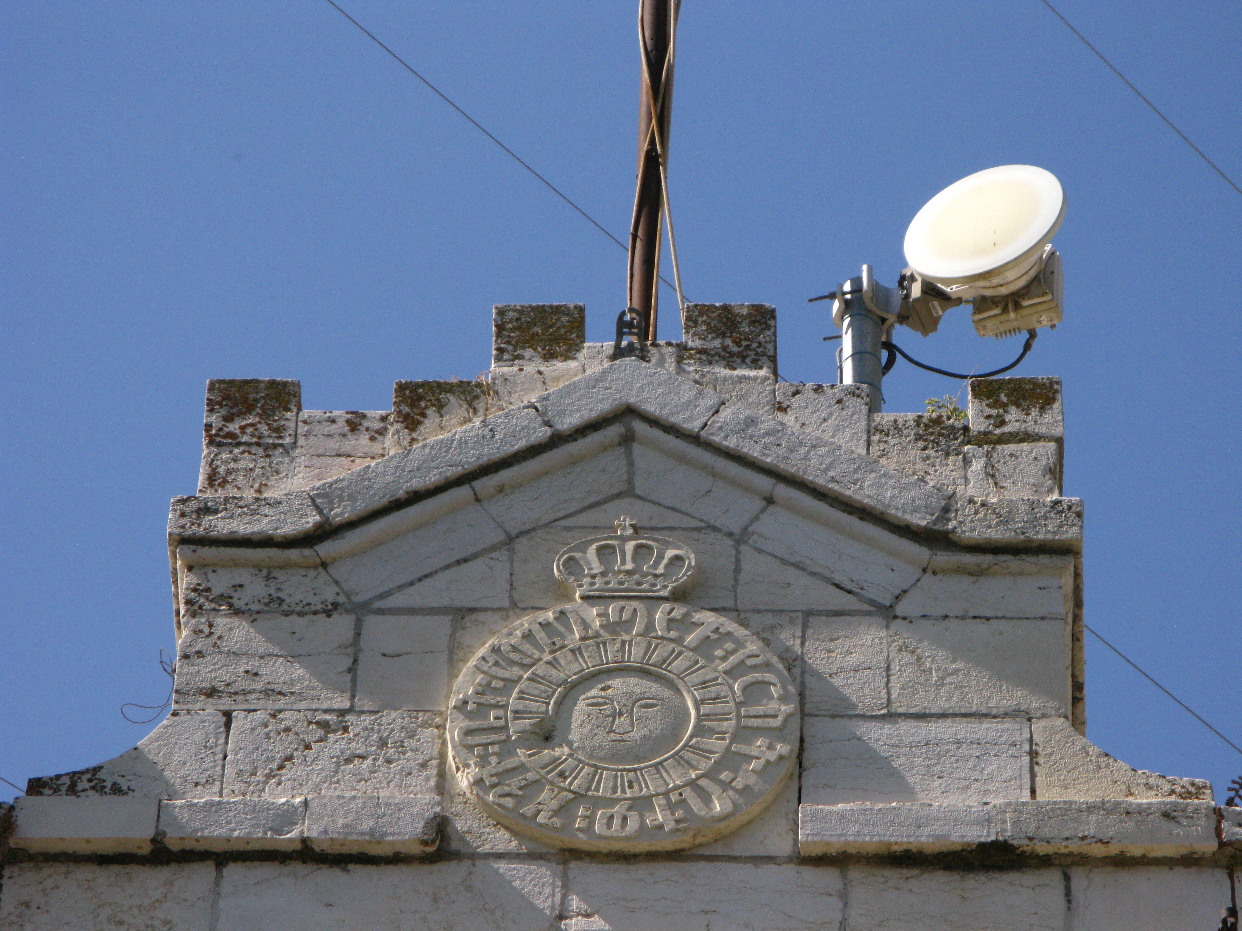 בניין קול ישראל ברחוב הלני המלכה בירושלים, משמש את תחנת הרדיו "קול ישראל" מאז ימי הרדיו המנדטורי ב-1939, ולסגירת רשות השידור.